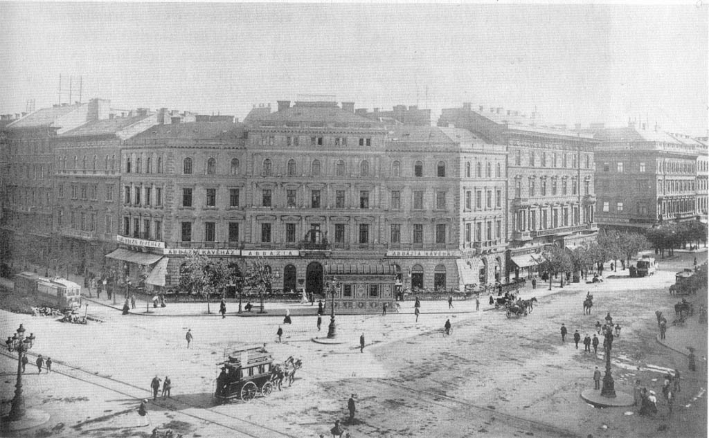 Az Oktogon 1900 körül, Budapest